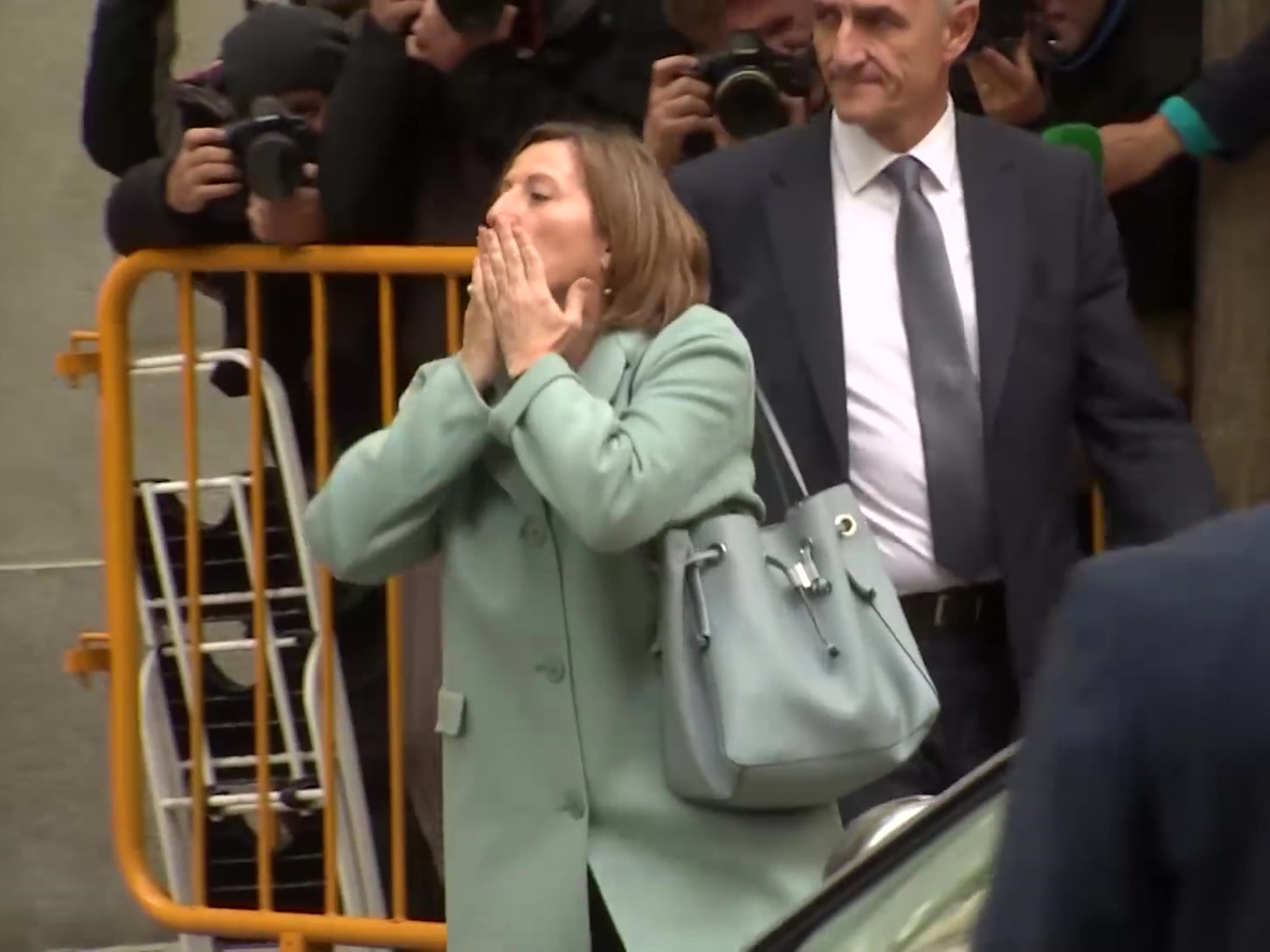 El magistrado del Tribunal Supremo, Pablo Llarena, ha aplazado la declaración de la presidenta del Parlament, Carme Forcadell, y otros cinco miembros de la Mesa a los que la fiscalía acusó de rebelión por allanar el camino en la Cámara autonómica para la declaración de independencia.